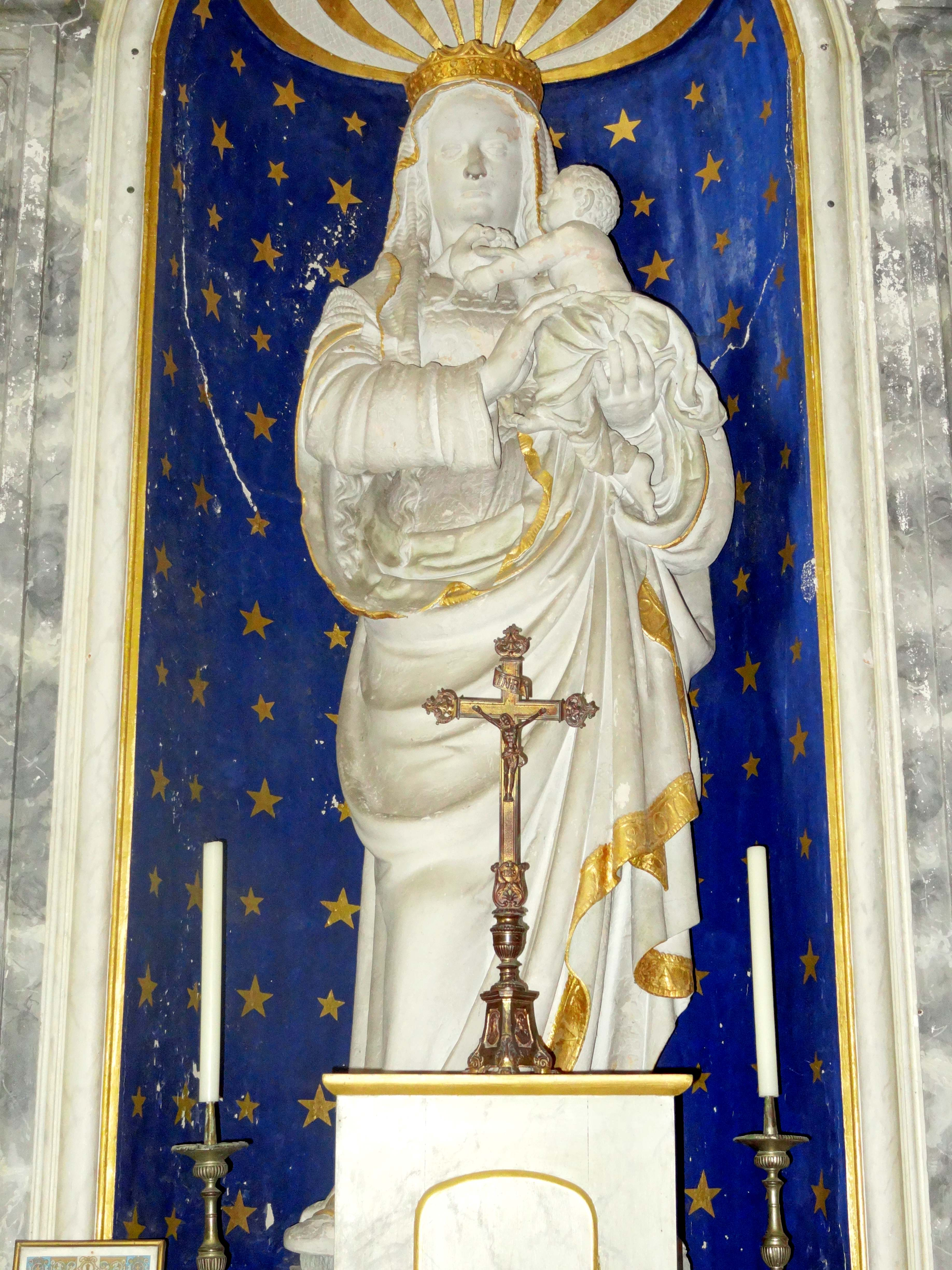 Mobilier de l'église - voir titre.